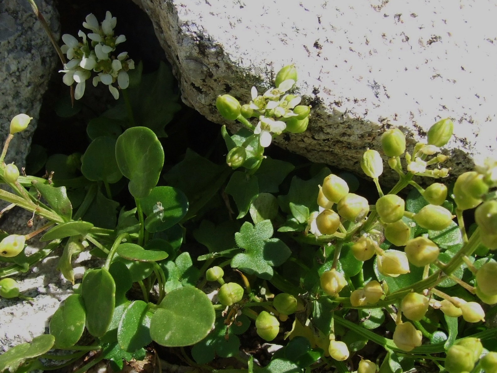 Cochlearia tatrae. Habitat: Zadnia Dolina Jaworowa, poniżej Lodowej Przełęczy